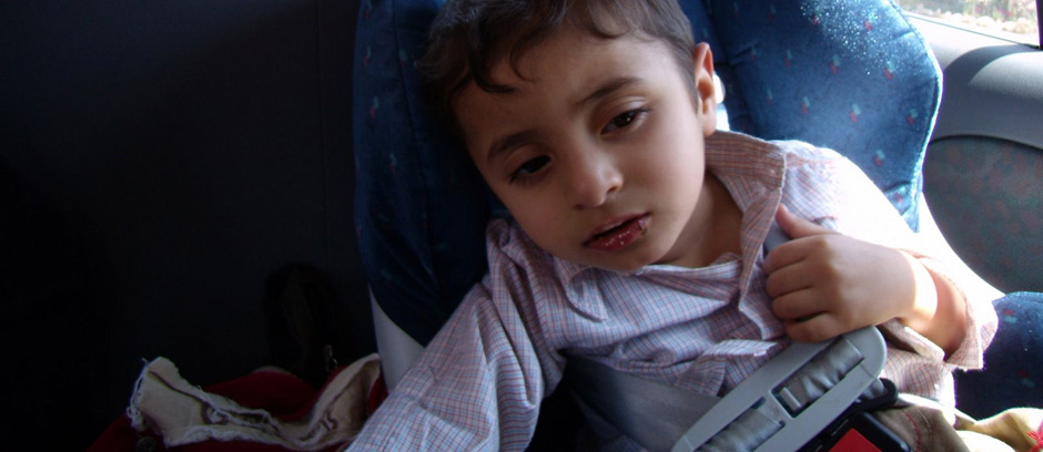 אדם ללא גבולות, ילד במכונית